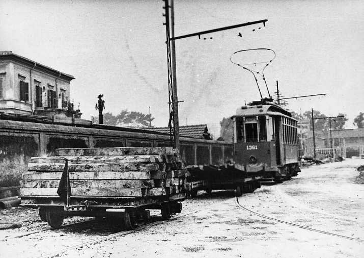 tram ringhoffer ex srto